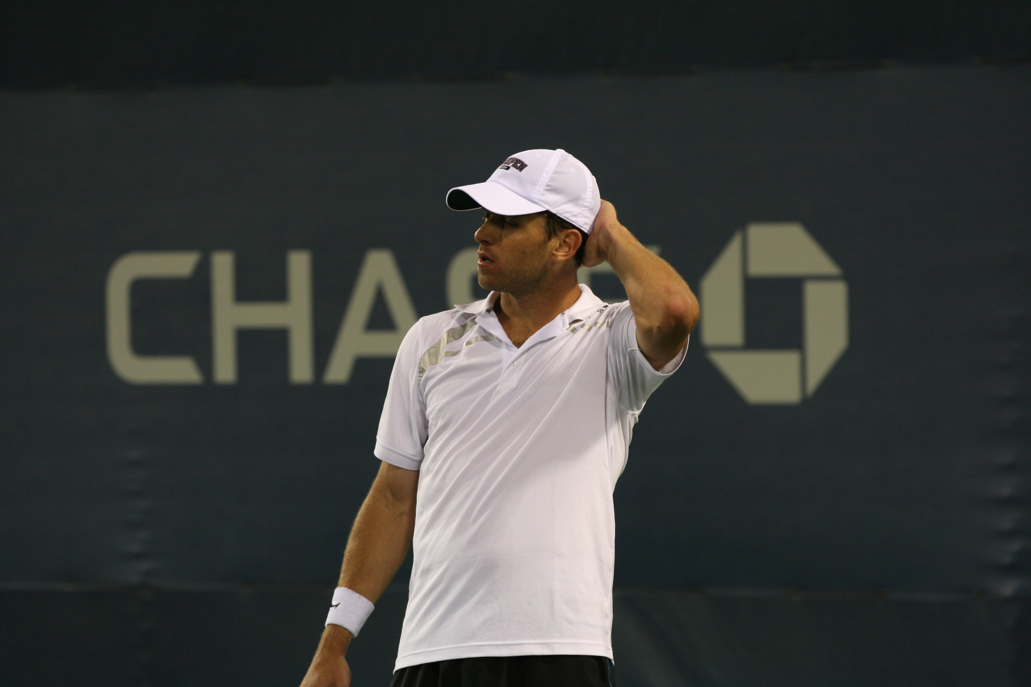 U.S. Open Wednesday, Sept. 2, 2009